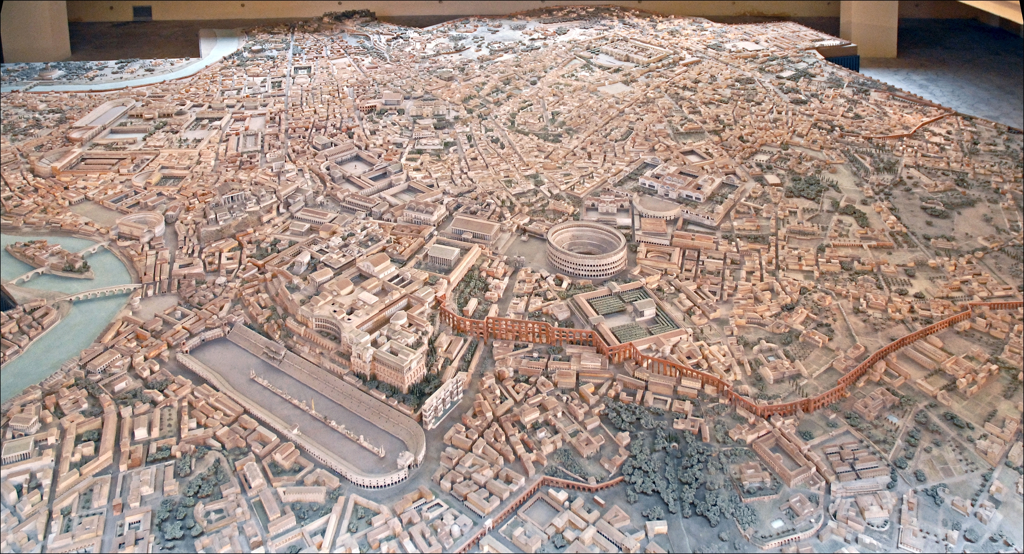 Vue générale de la maquette de Gismondi